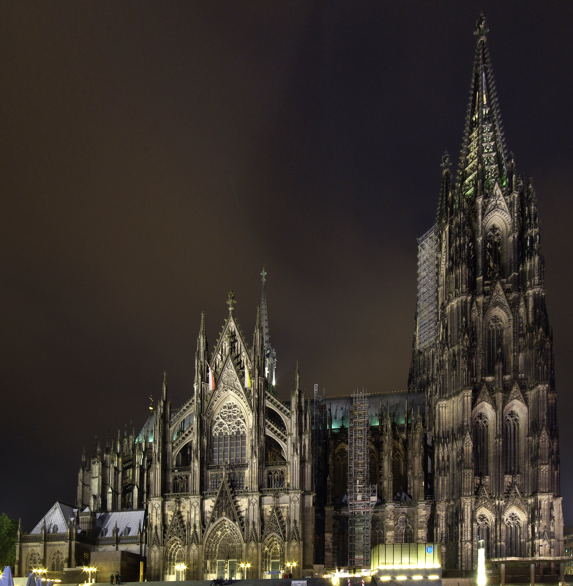 Köln Dom Katedrali